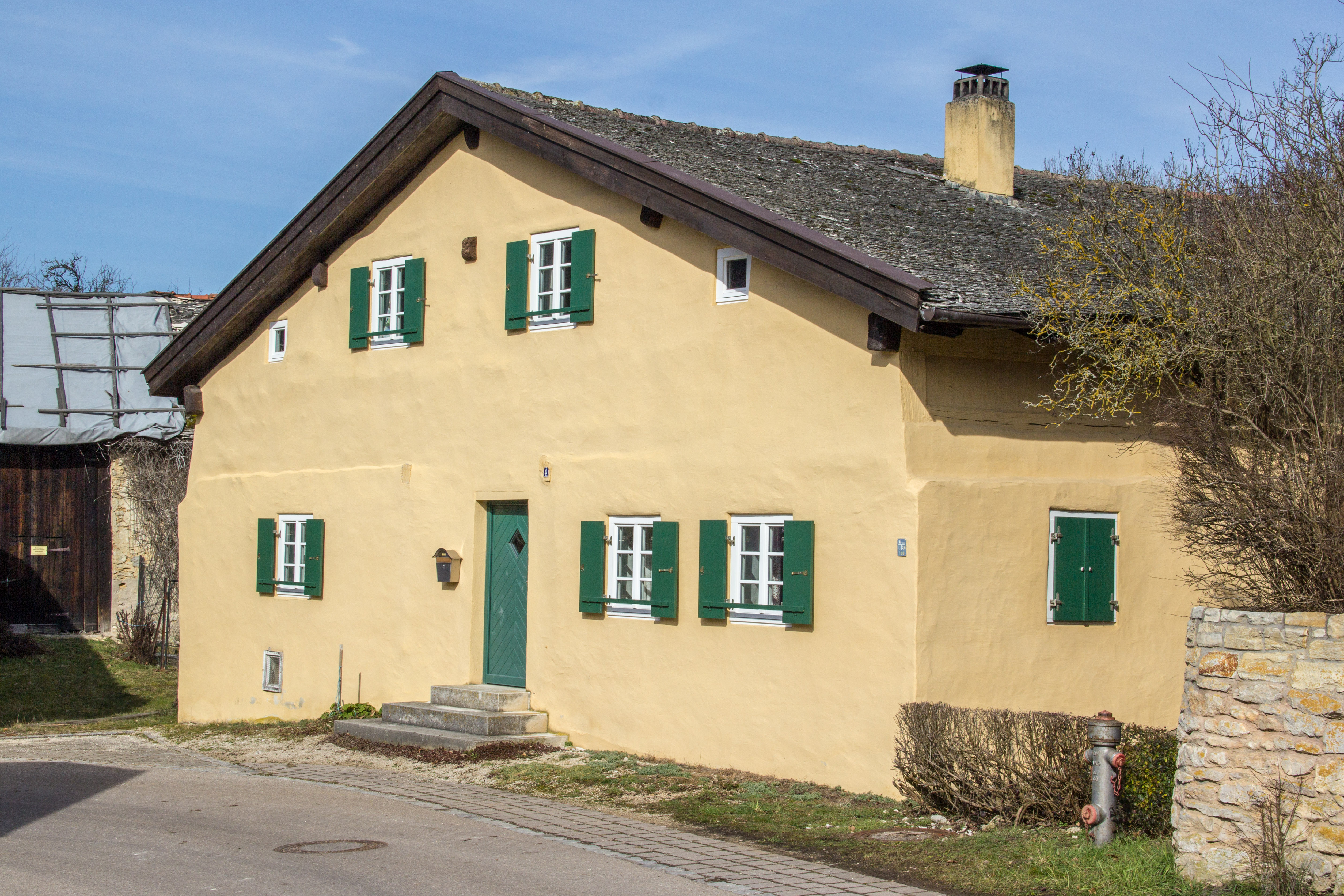 Eßlingen, Solnhofen, Bauernhaus, Baudenkmal